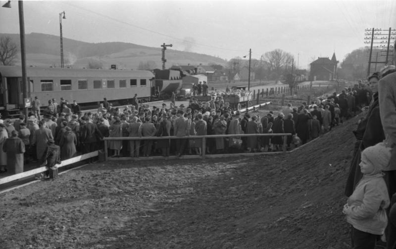 Lager Friedland Ankunft der Wissenschaftler aus Sochumi (Lageraufnahmen und Ankunft von Aussiedlern aus Polen), 12. Februar - 16. Februar 1958